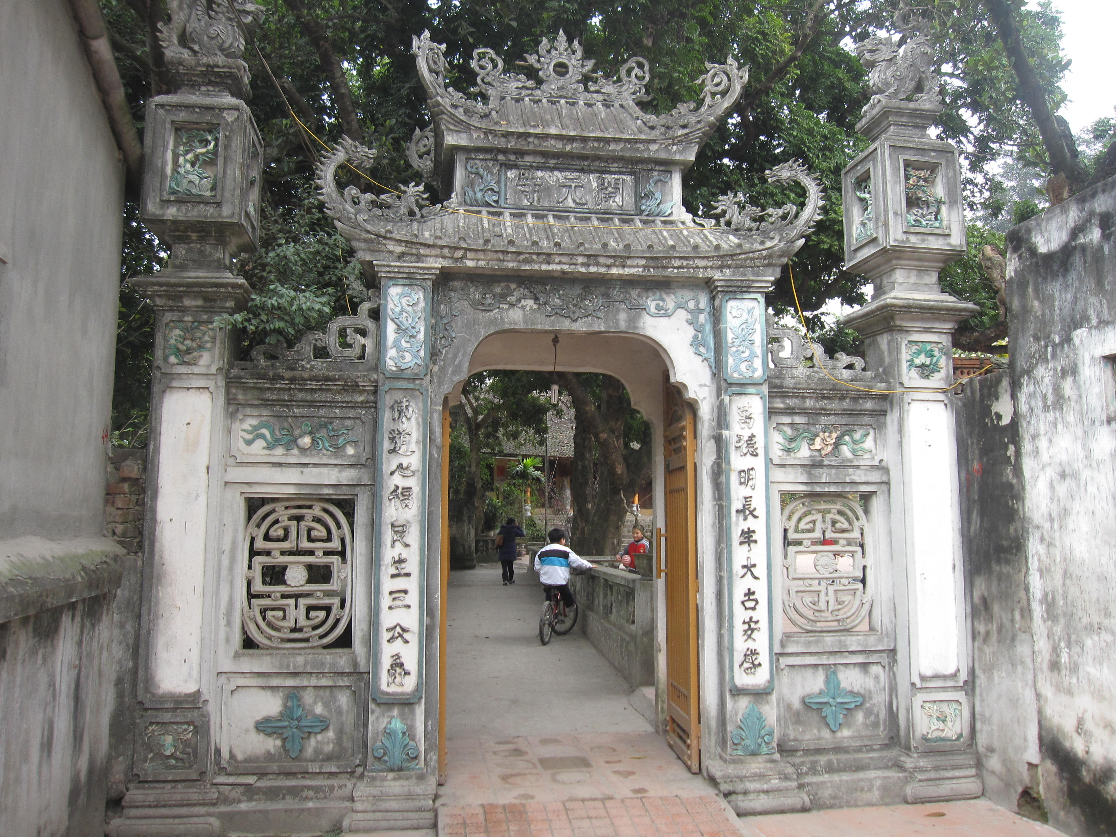 Cổng chùa Khai Nguyên, phường Xuân La, quận Tây Hồ, Hà Nội, Việt Nam